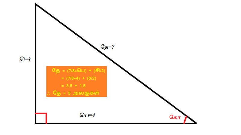 மேலதிகத் தகவல்களுக்கு